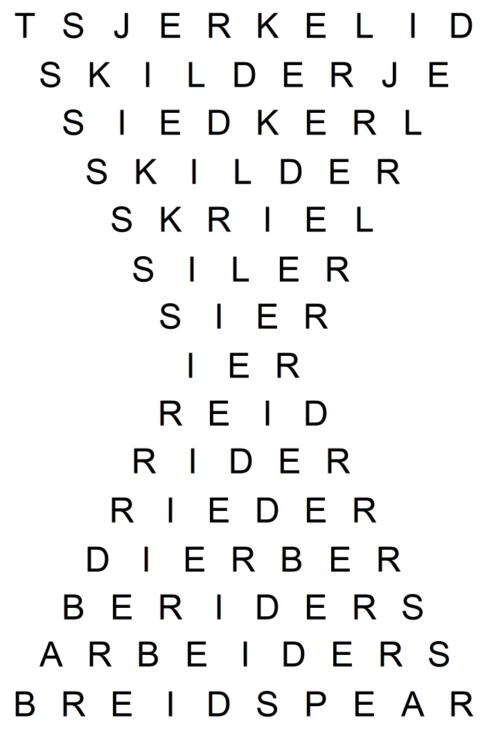 Sânglês